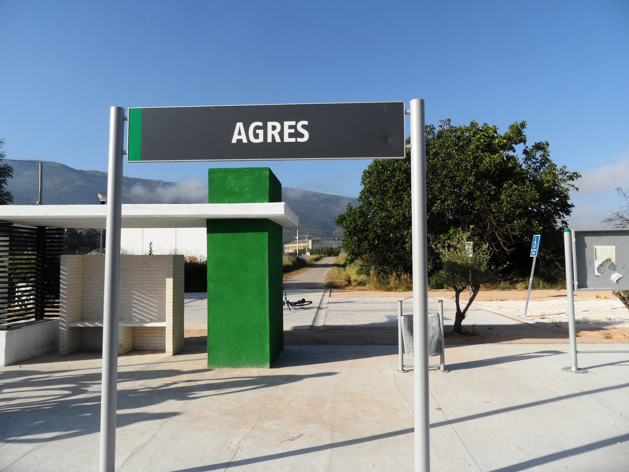 Estació de la renfe d'Agres.